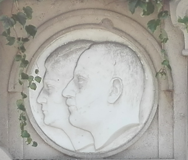 Bildnismedaillon von Friedrich von Bassermann-Jordan bei seinem Grab auf dem Friedhof Deidesheim